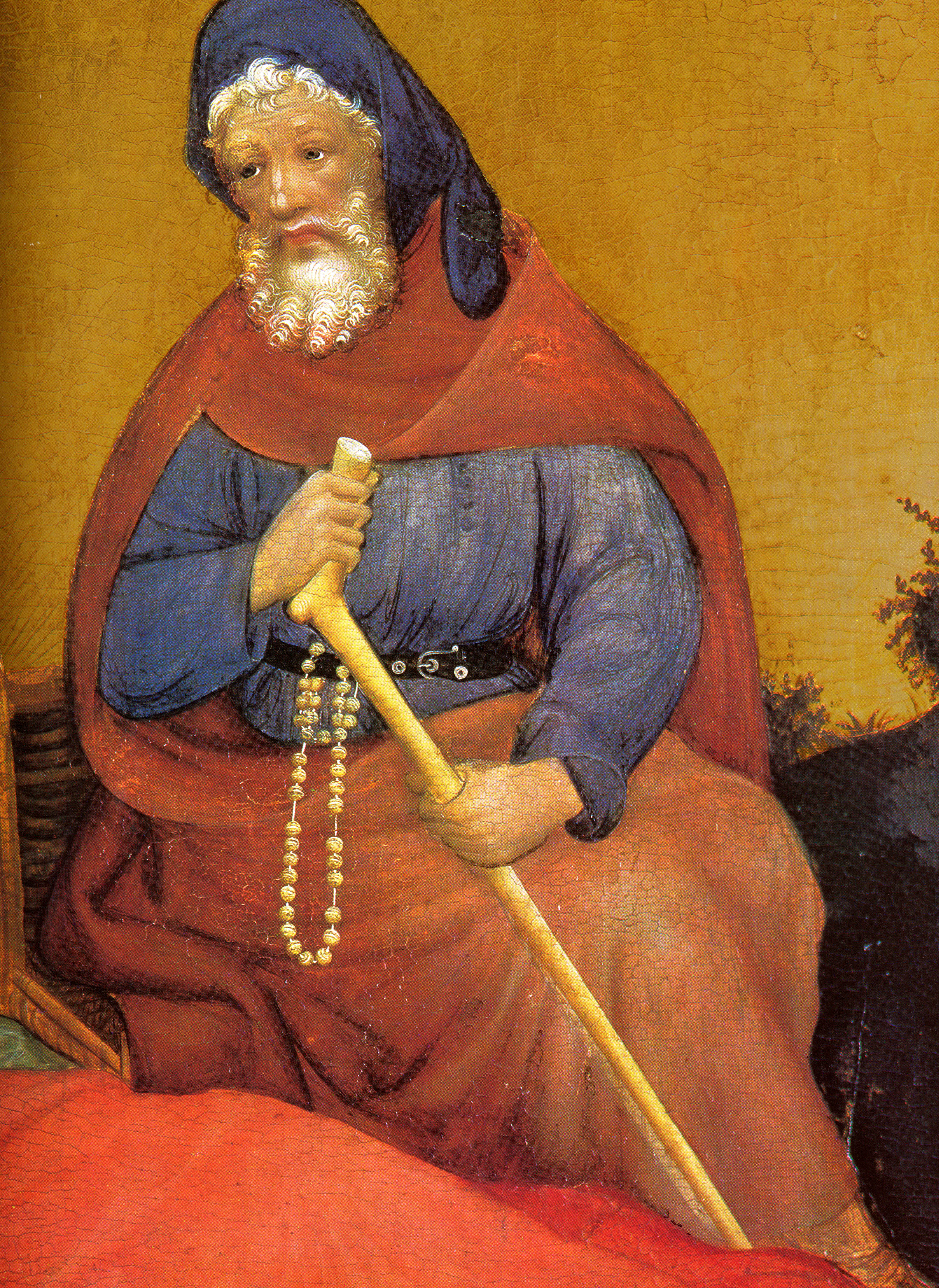 Dortmund, Marienkirche, Konrad von Soest, Marienaltar, mittlere Tafel, Detail (Josef)